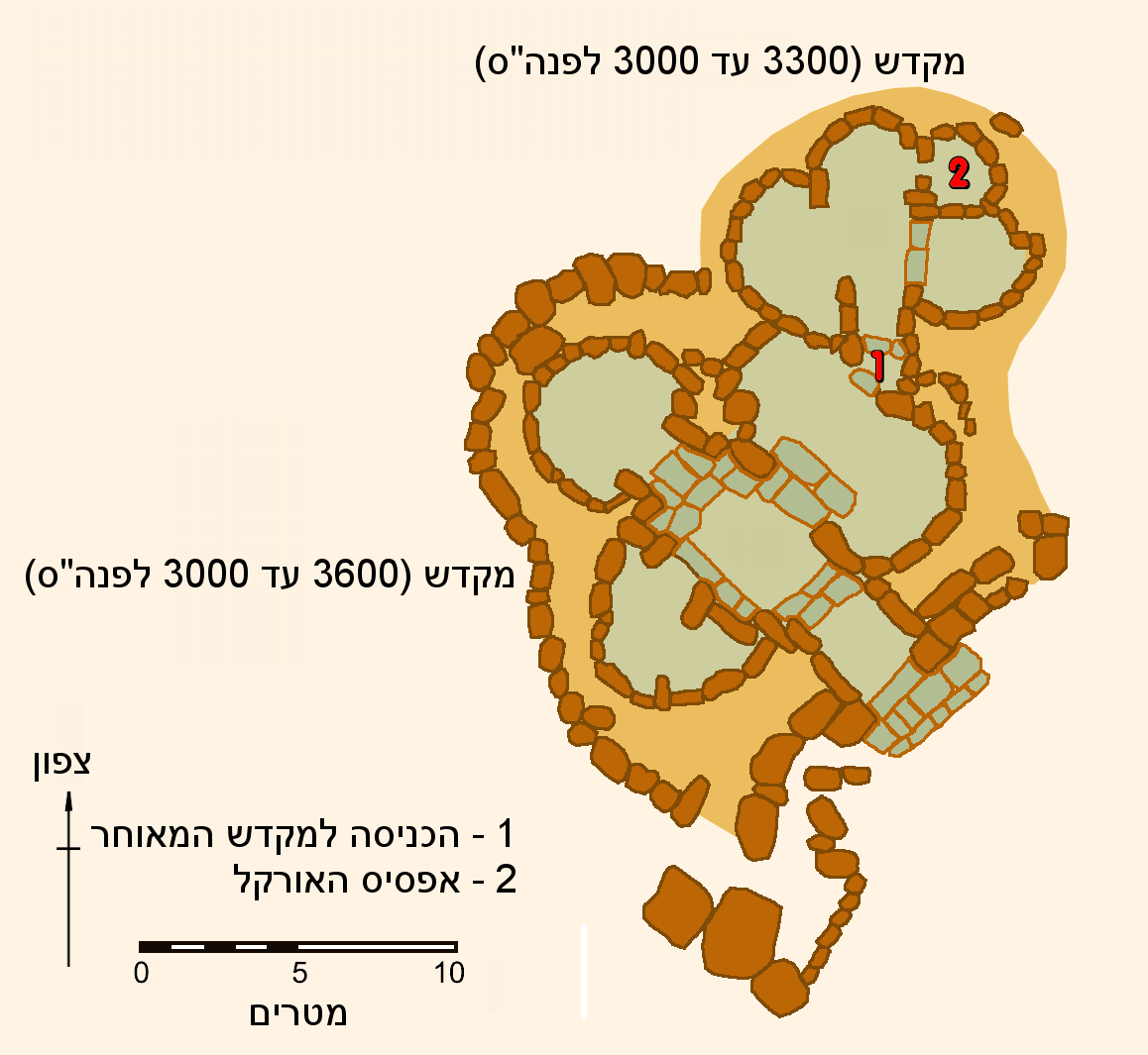 Ta Hagrat plan